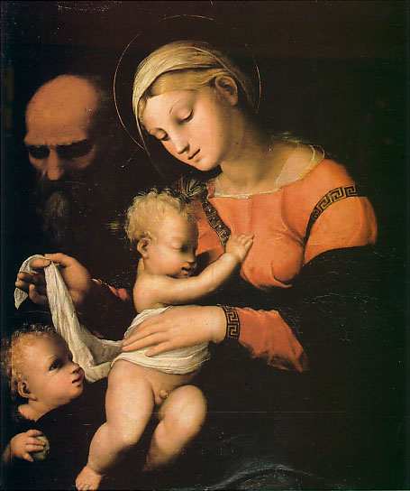 La obra representa a los tres miembros de la Sagrada Familia, Jesucristo, la Virgen María y San José, junto al futuro profeta San Juan Bautista.